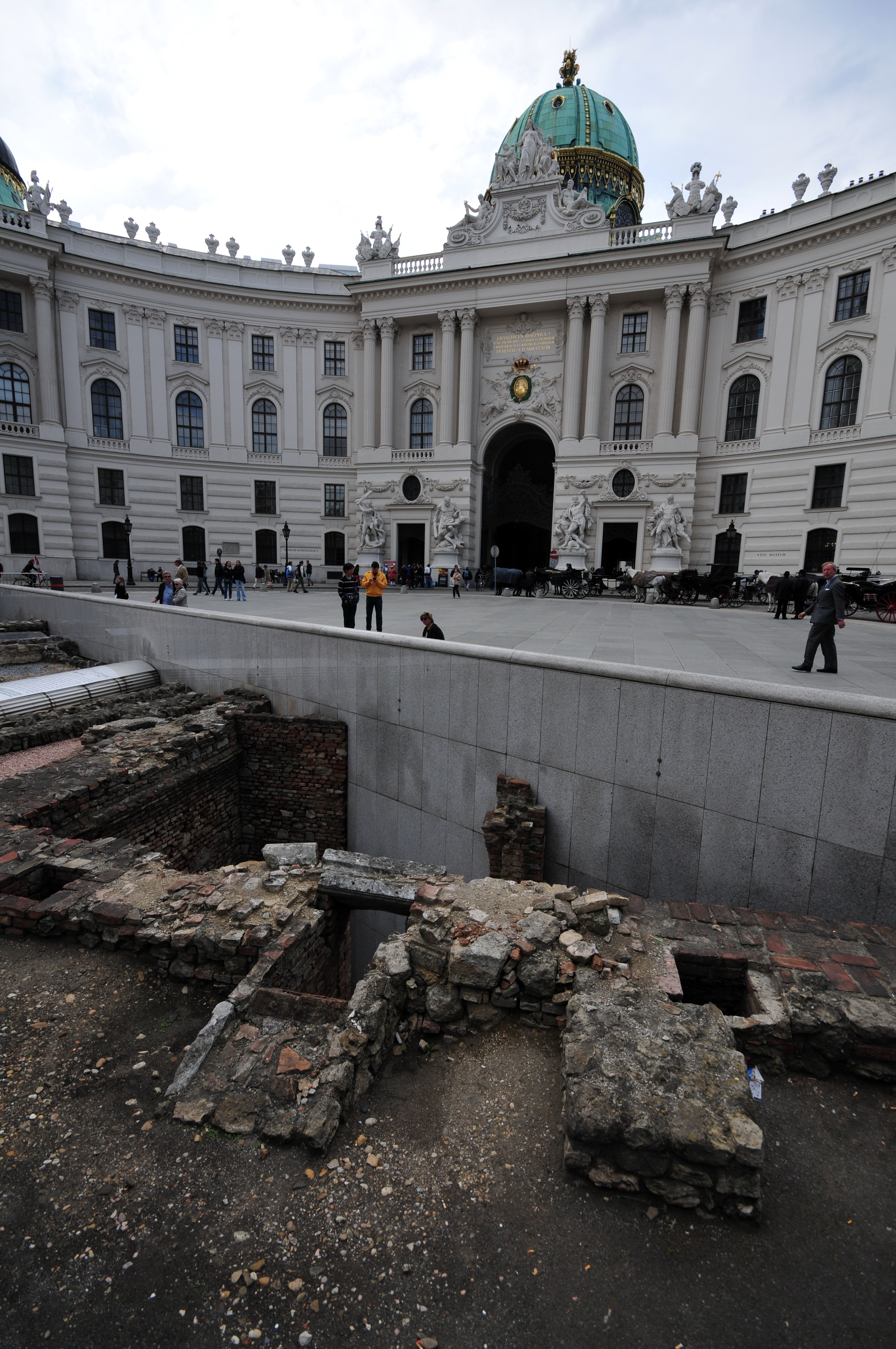 Wien